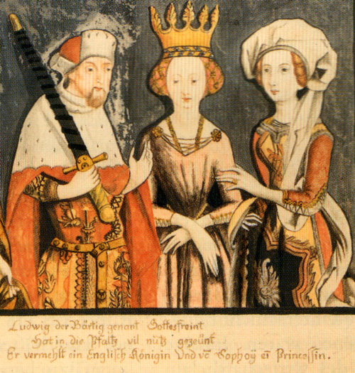 Kurfürst Ludwig III. von der Pfalz mit beiden Ehefrauen